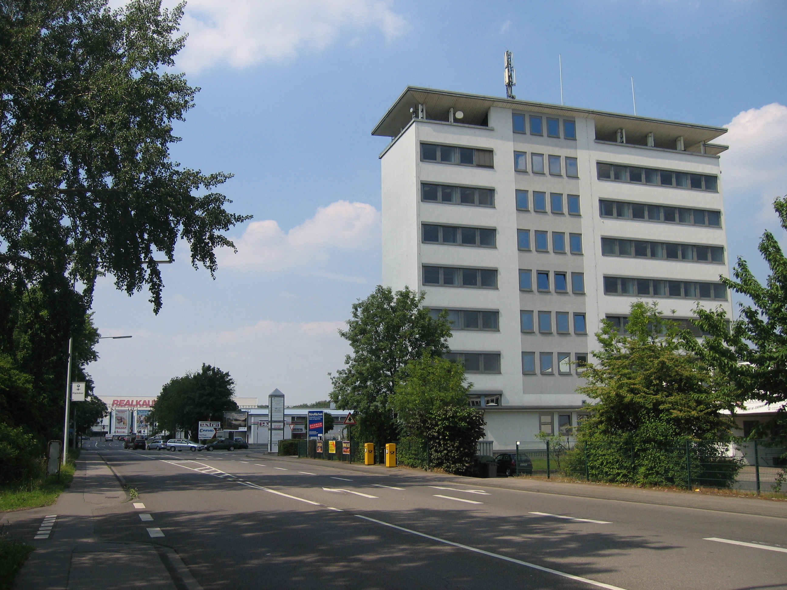 Eine Straße in Köln-Marsdorf